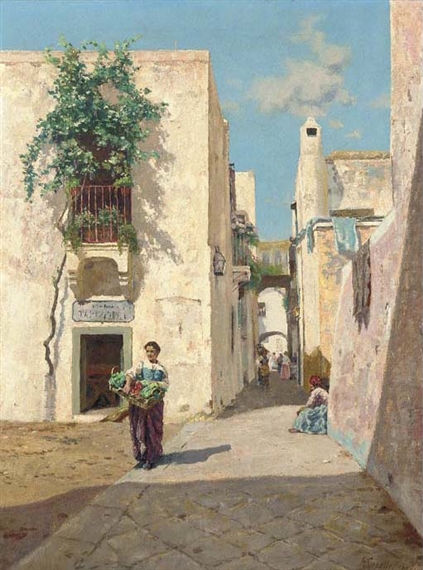 Strada al sole di Capri, olio su tela, 80 x 60.5 cm., firmato, coll. privata